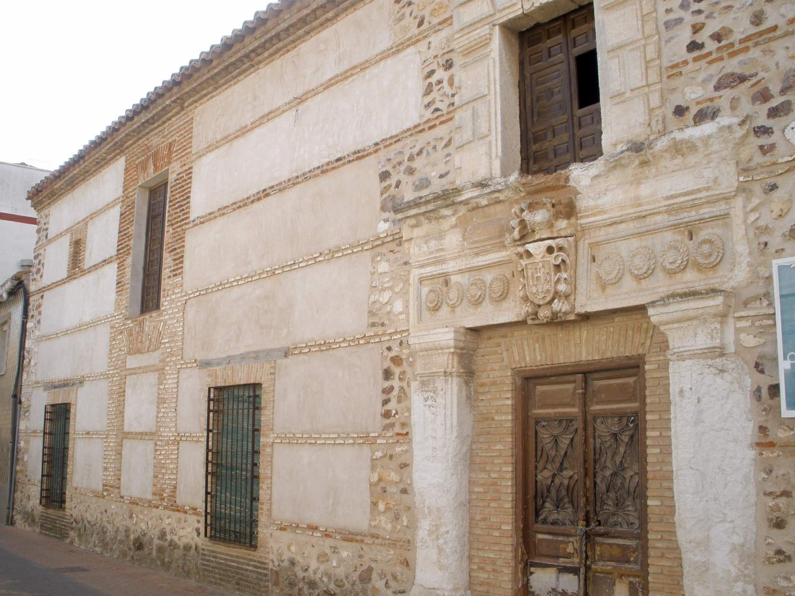 Casa de la Inquisición (Argamasilla de Calatrava, Ciudad Real)